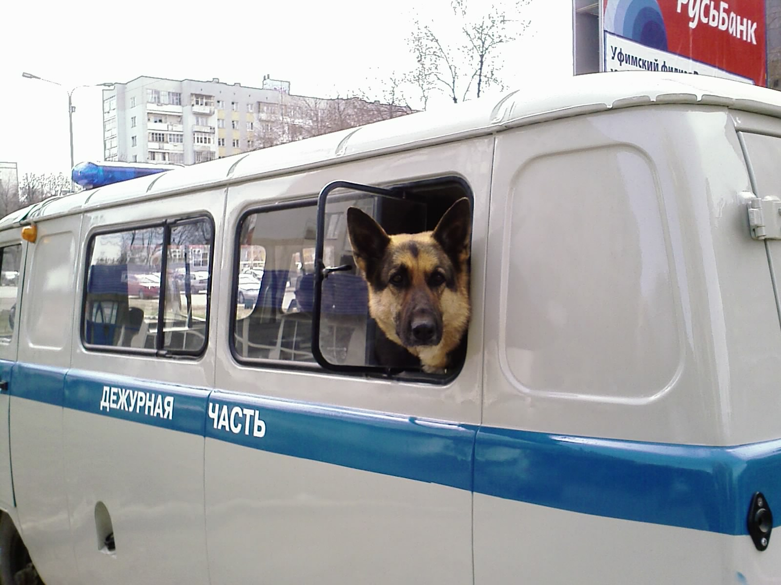 засада на перекрестке кирова-цюрупы